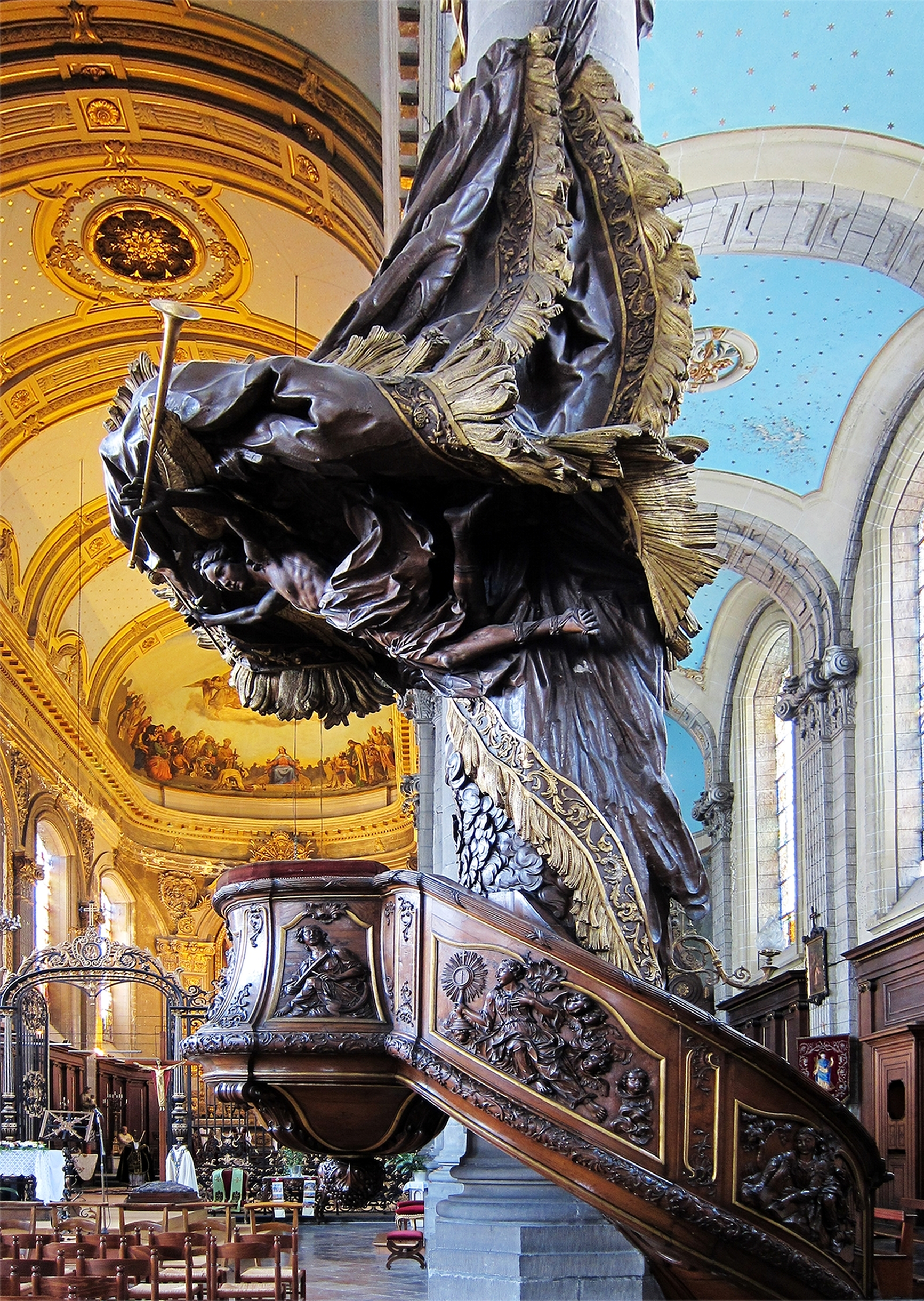 Lille (France - dép. du Nord) — Chaire de Vérité de l'église Saint-André sculptée en style Rocaille par Jean-Baptiste Danezan -. Réf → .